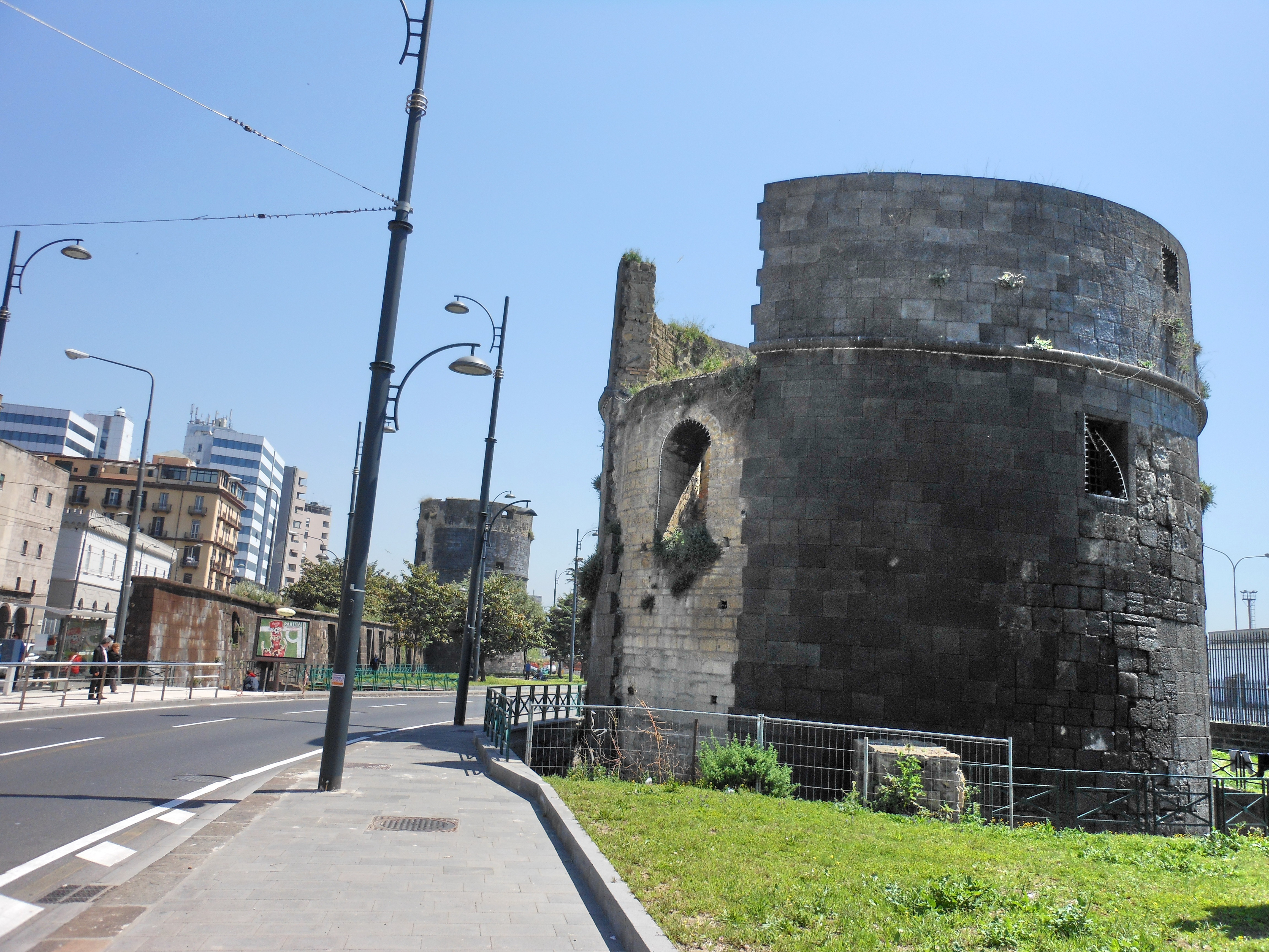 Resti del Castello del Carmine in via Marina a Napoli: in primo piano torre Brava, sullo sfondo torre Spinella.